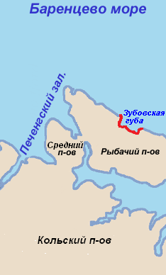 Зубовская губа на карте северо-западной части Кольского полуострова